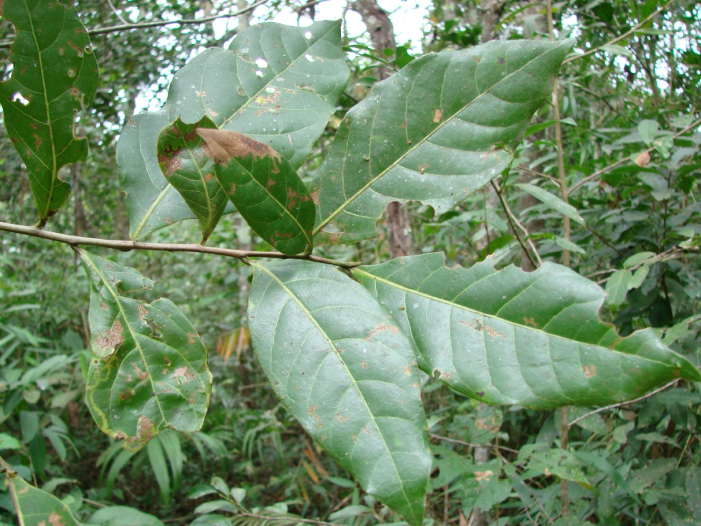 Nectandra cissiflora Nees (Sin. het. Nectandra myriantha) - LAURACEAE Parque Nacional da Chapada dos Veadeiros - Alto Paraíso de Goiás - Goiás - Brasil.